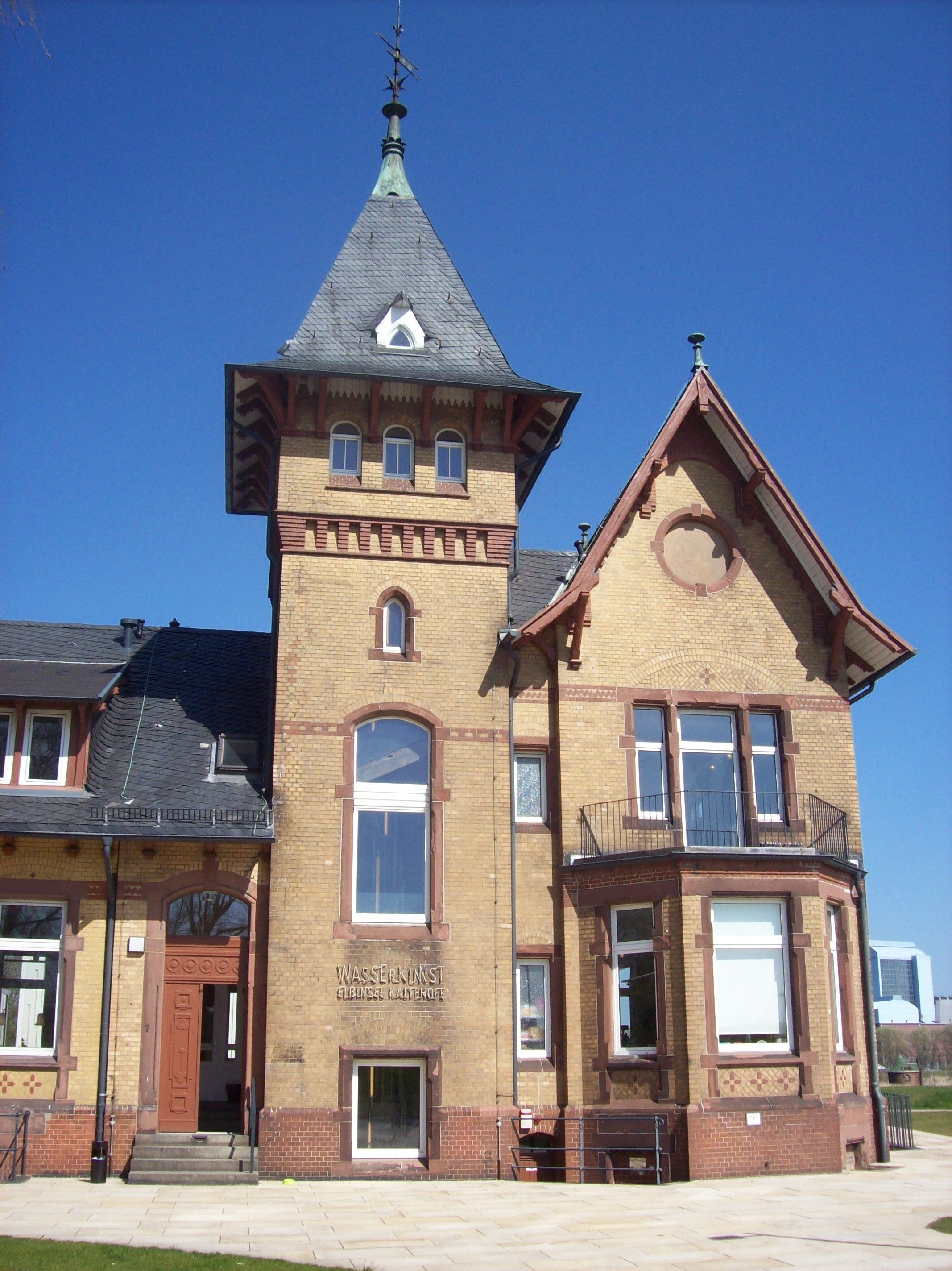 Der schöne Turm vom ehemaligem Labor. Heute wird es als Cafe´mit Terrasse, Museum, Shop und Informationspunkt genutzt. This is a photograph of an architectural monument. ,14431